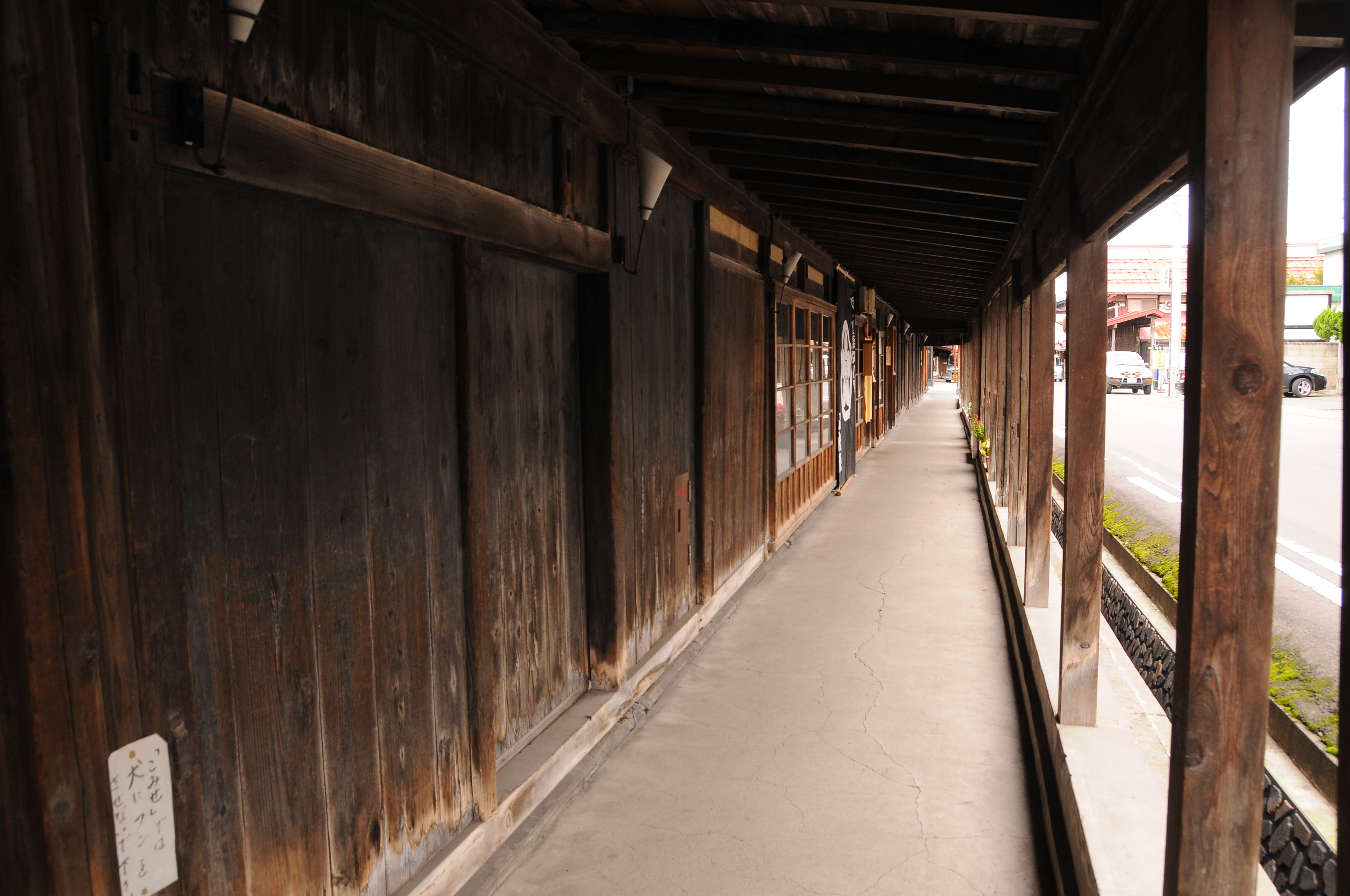 青森県黒石市中町通りのこみせ